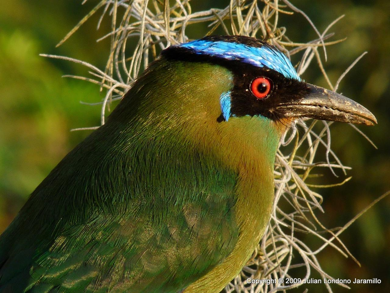 Barranquillo. Manizales, Colombia